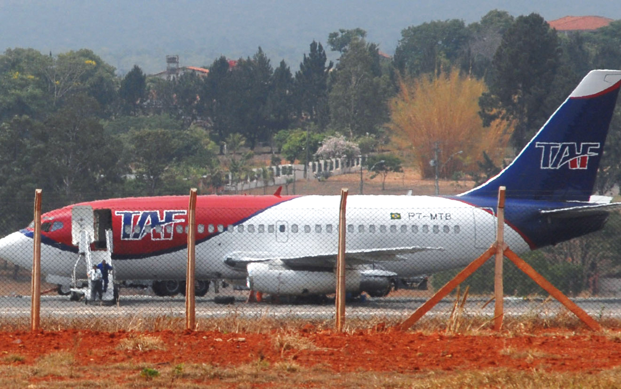 Aviòn de TAF